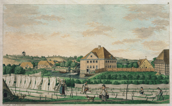 Carl Daniel Voigts: Ansicht von Neumühlen bei Kiel